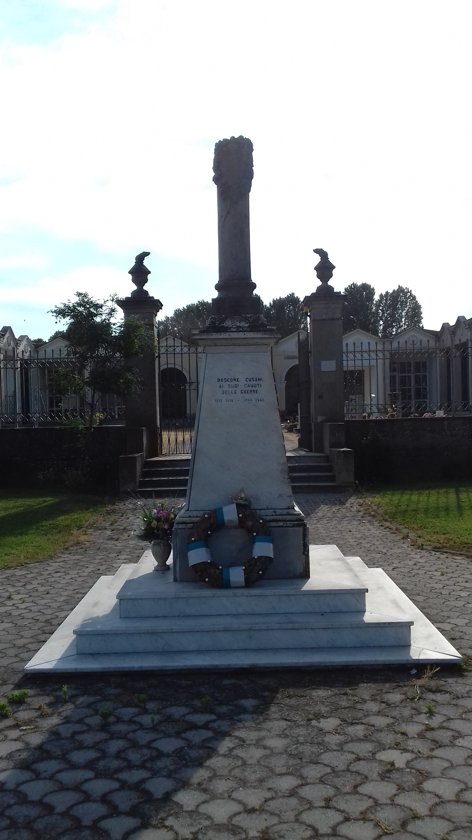 monumento